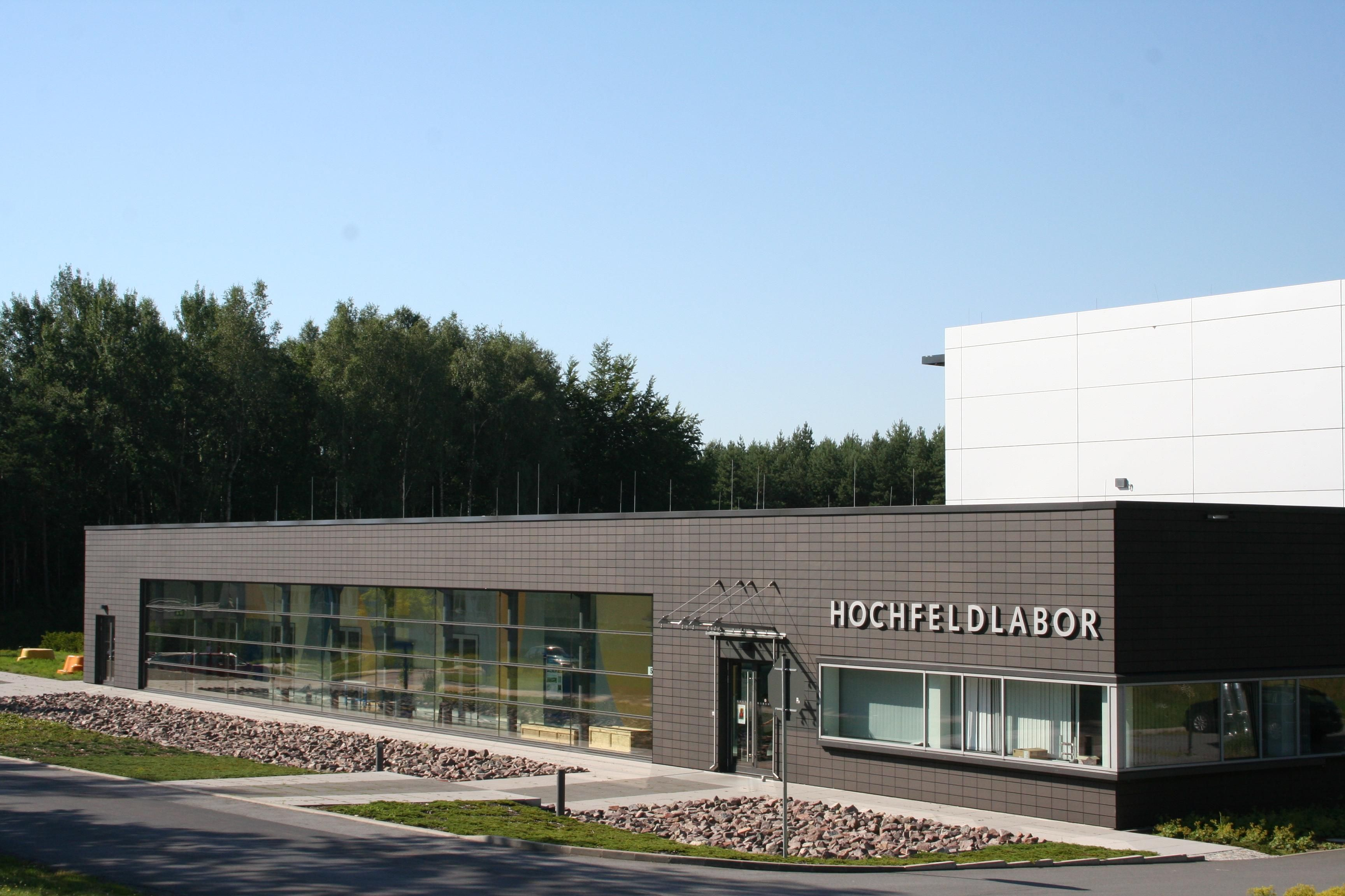 Hochfeldlabor Dresden Gebäude Frontalansicht